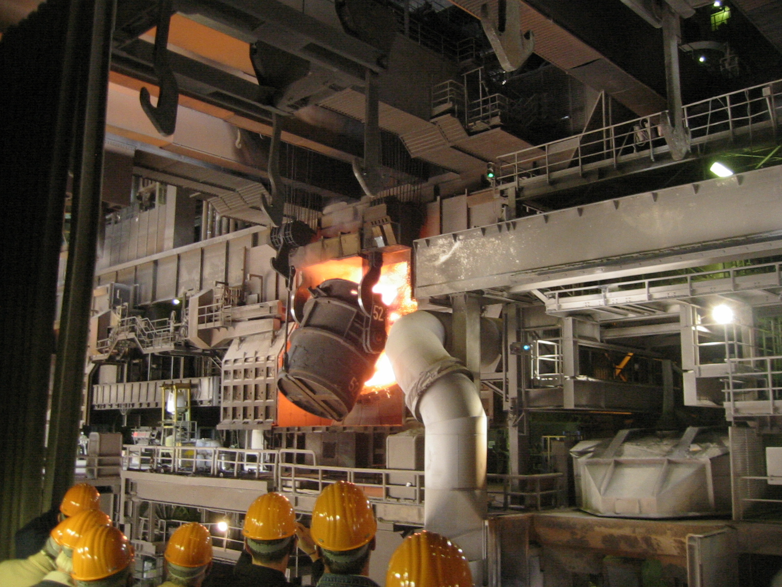 Sauerstoff Blaskonverter bei ThyssenKrupp in Duisburg